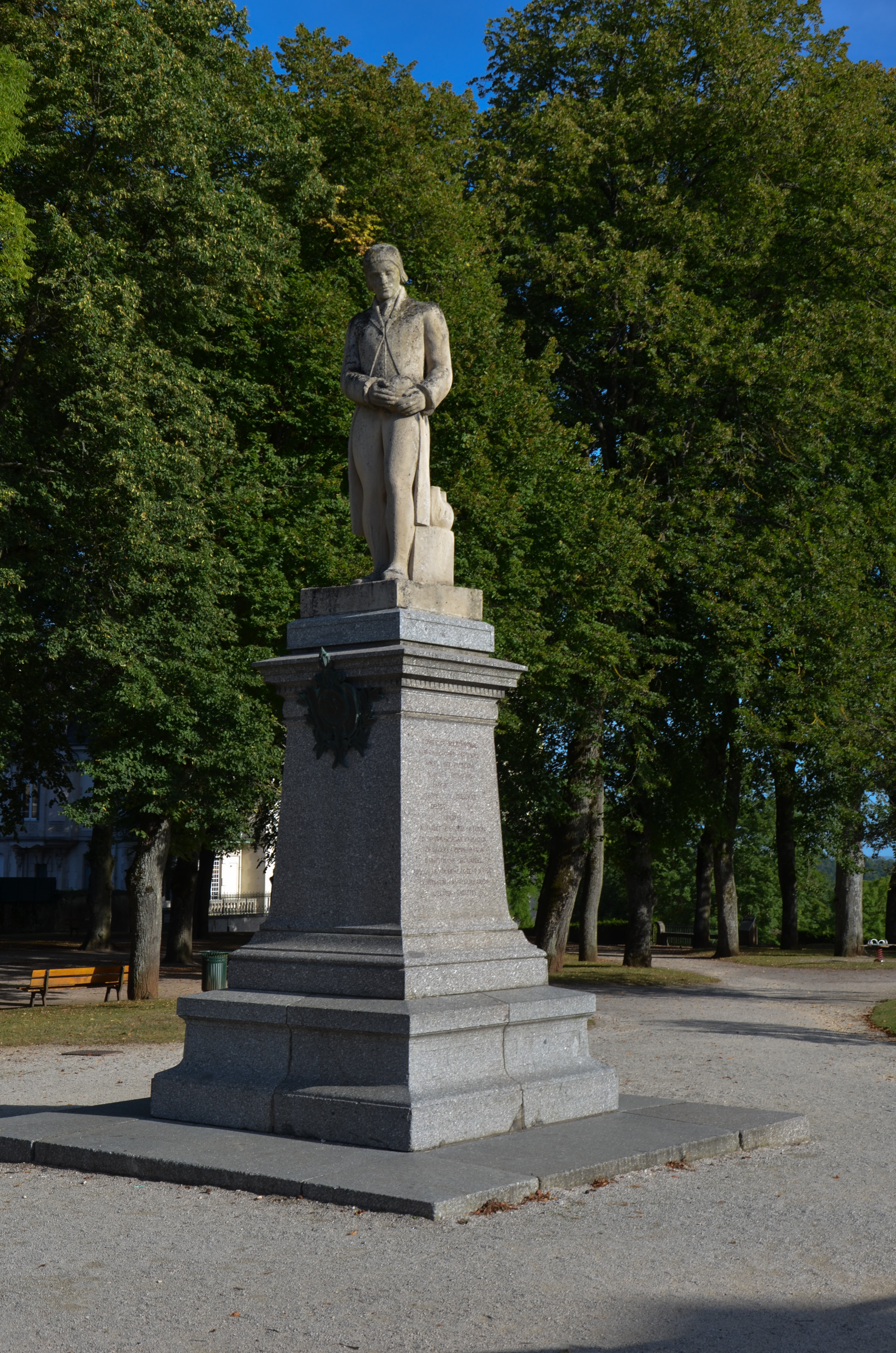 Statue de Philippe Lebon à Chaumont, Haute-Marne, Champagne-Ardennes, France